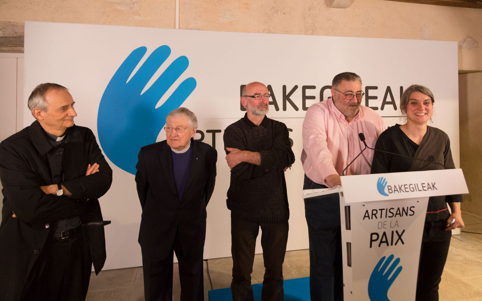 Apirilaren 8an Bakearen Artisauek publikoki planteamentua azaldu duten unea, Baionan